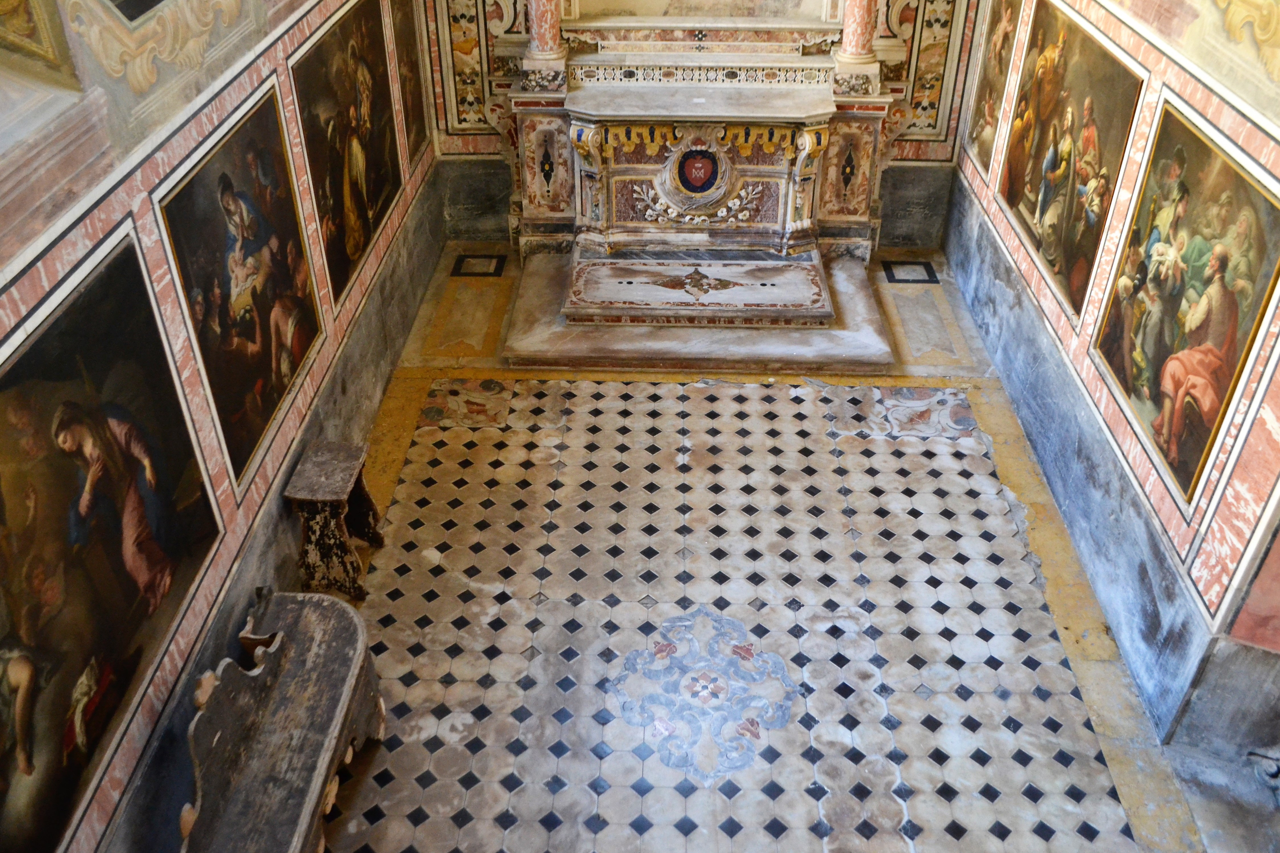 Cappella dell'Idra - Complesso di San Gregorio Armeno di Napoli